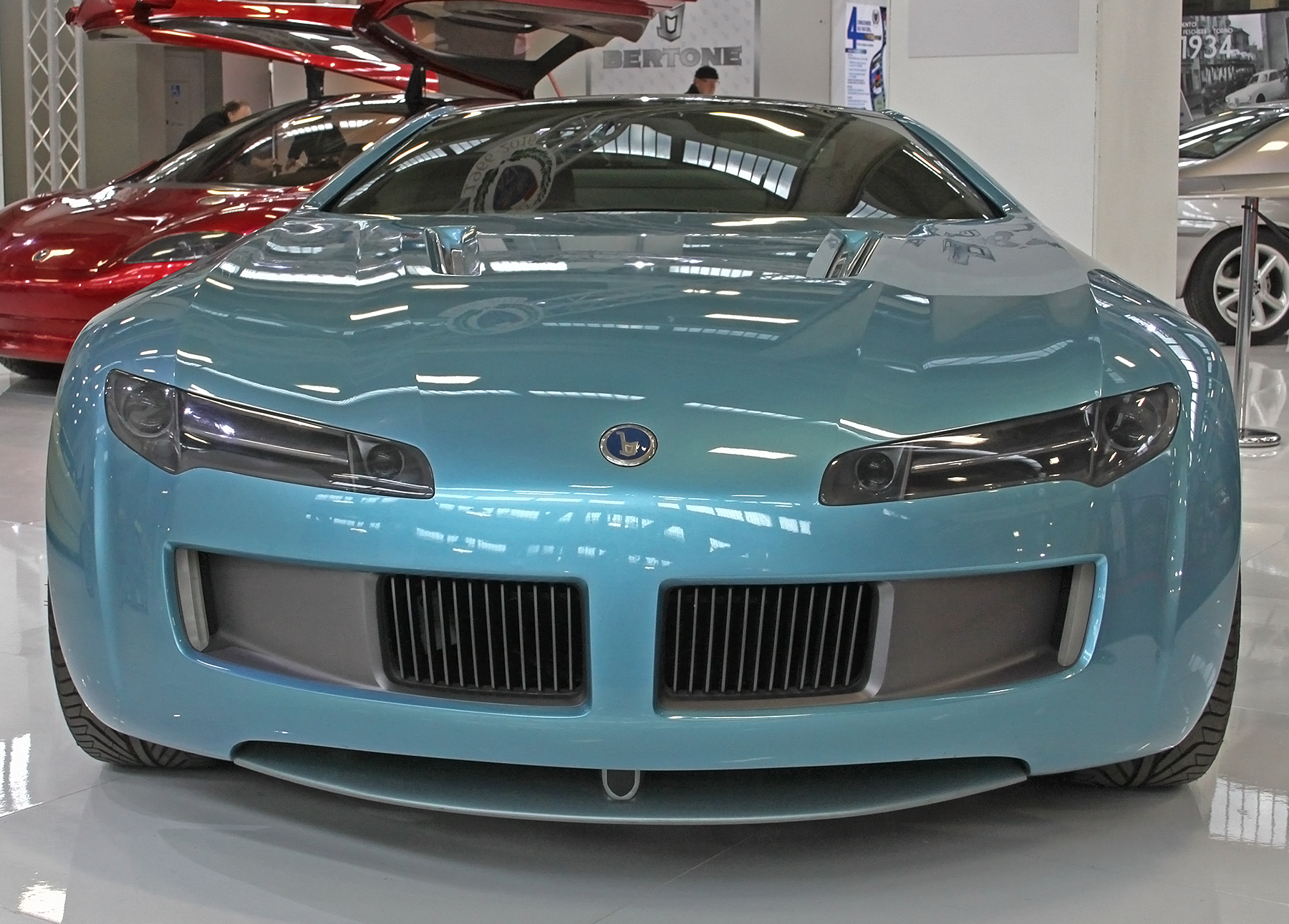 BMW Birusa Bertone 2003